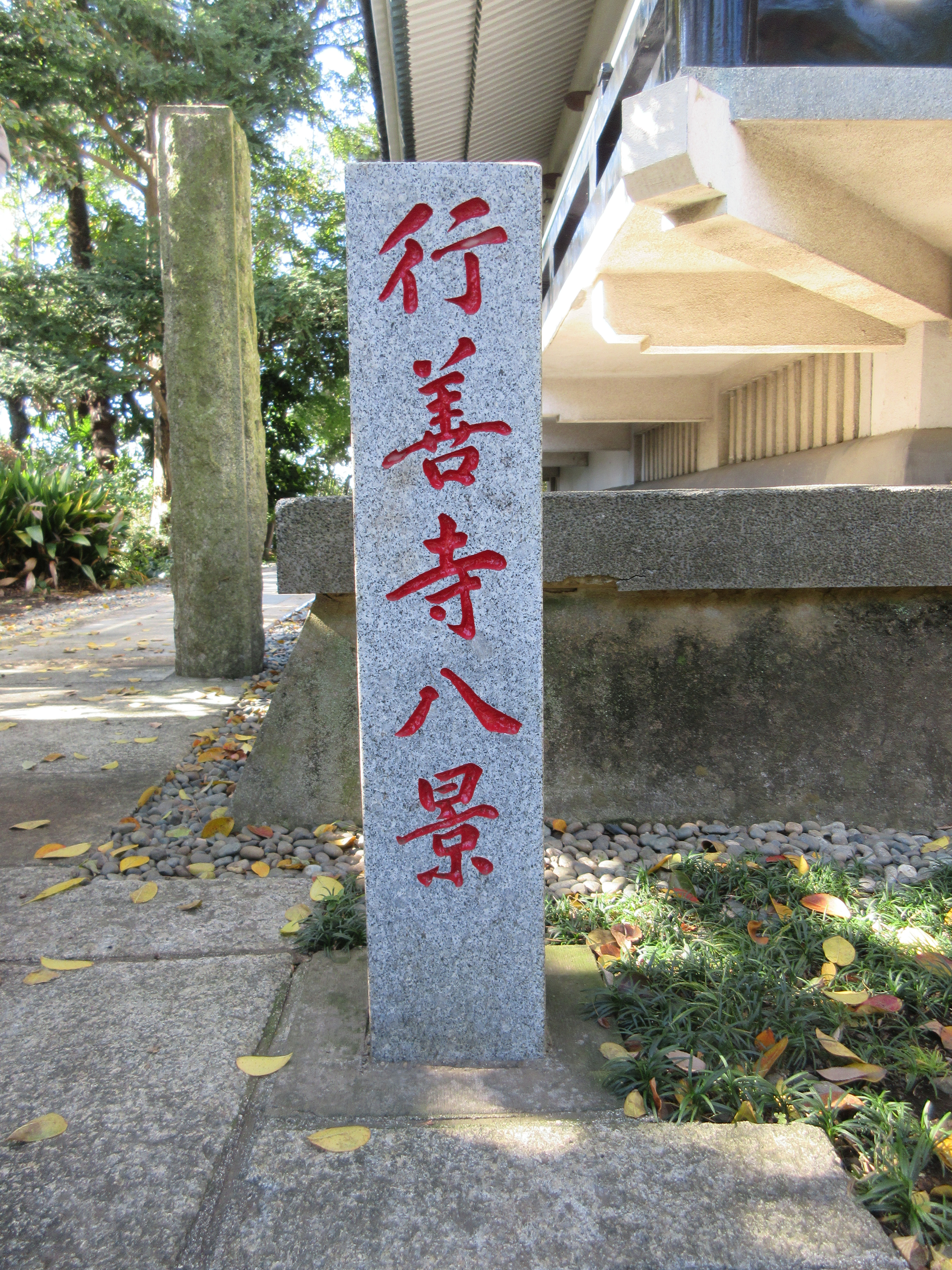 行善寺八景の立石の画像